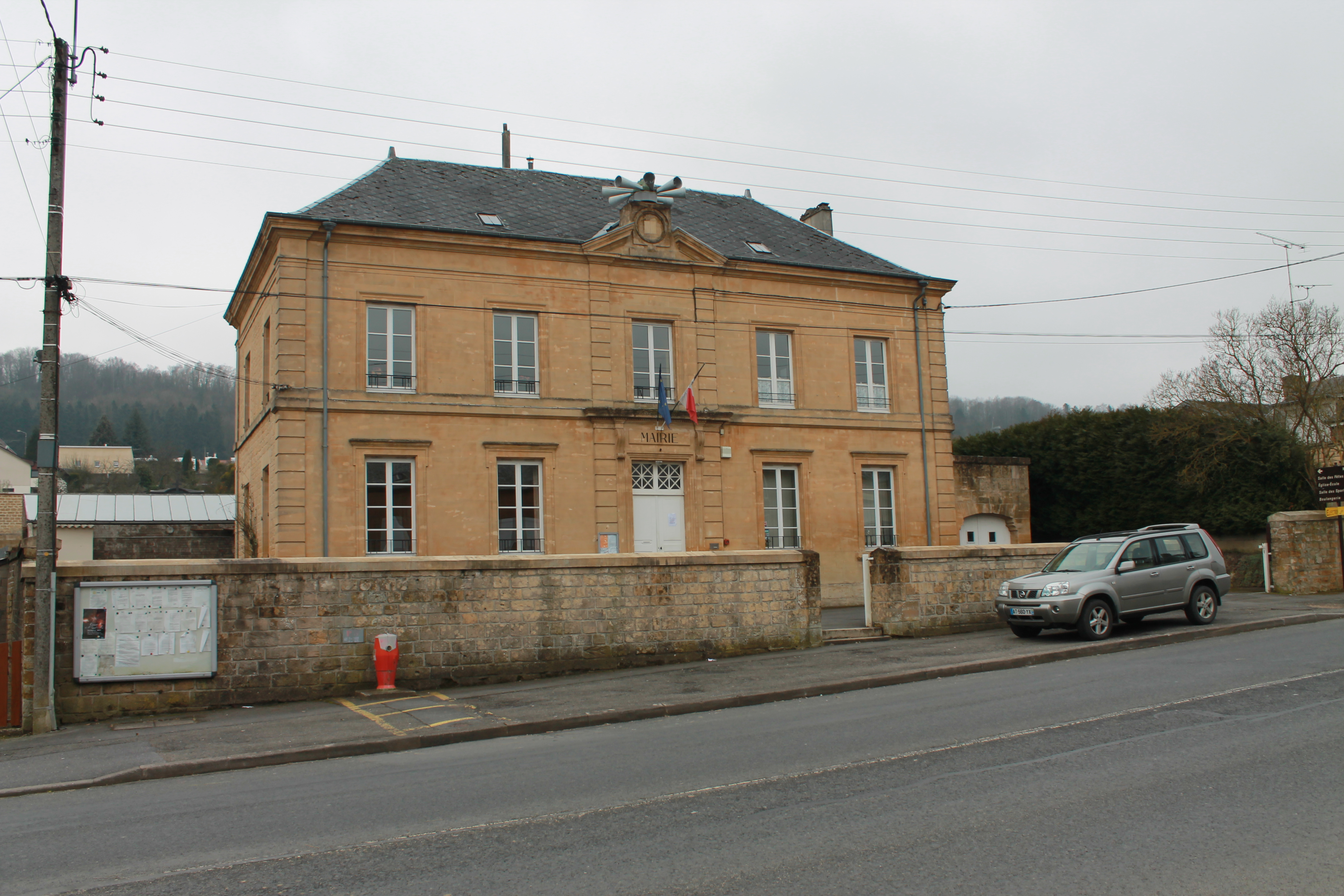 Mairie de Dom-le-Mesnil